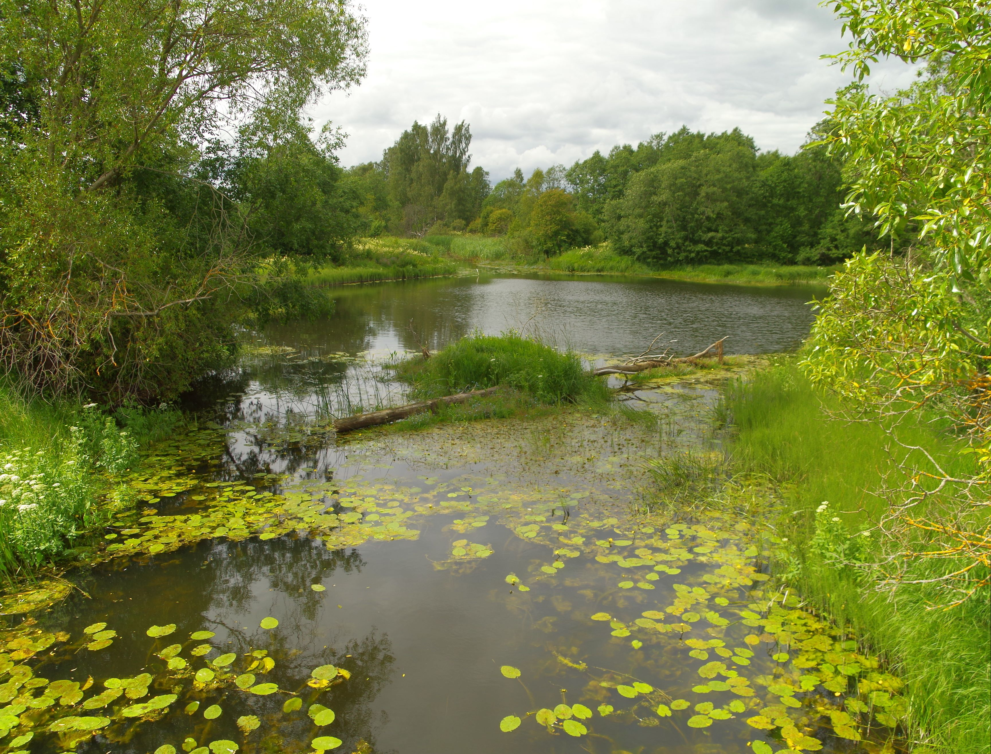 Leivajõgi on jõgi Harjumaal, Pirita jõe parempoolne lisajõgi.